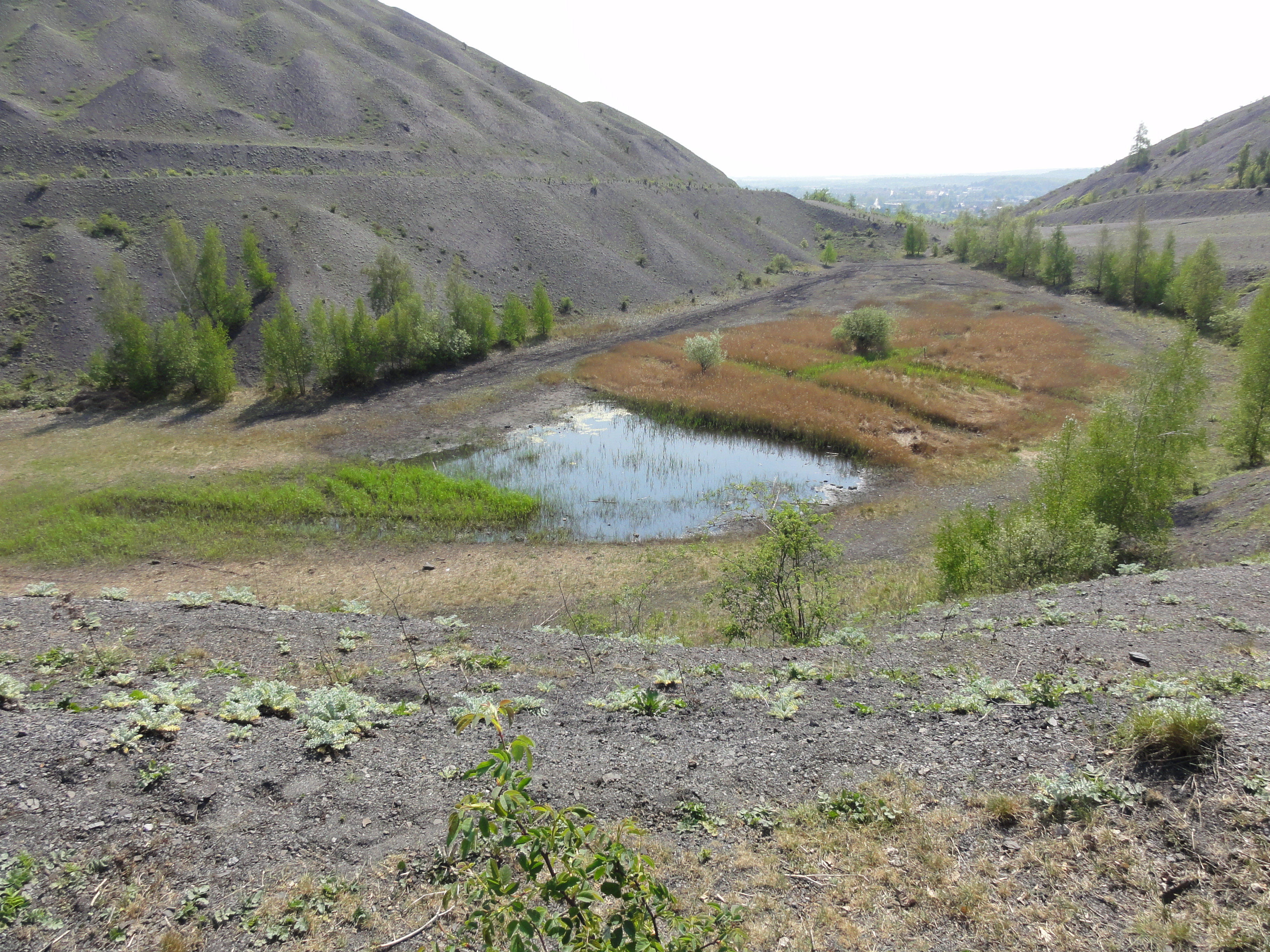 Terrils nos 74, 74A et 74B respectivement dénommés 11 - 19 de Lens Est, 11 - 19 de Lens Ouest et 11 - 19 de Lens Nouveau, fosse n° 11 - 19 de la Compagnie des mines de Lens dans le bassin minier du Nord-Pas-de-Calais, Loos-en-Gohelle, Pas-de-Calais, Nord-Pas-de-Calais, France. Les terrils nos 74, 74A et 74B sont inscrits sur la liste du patrimoine mondial de l'Unesco le 30 juin 2012 et y constituent en partie le site no 63.